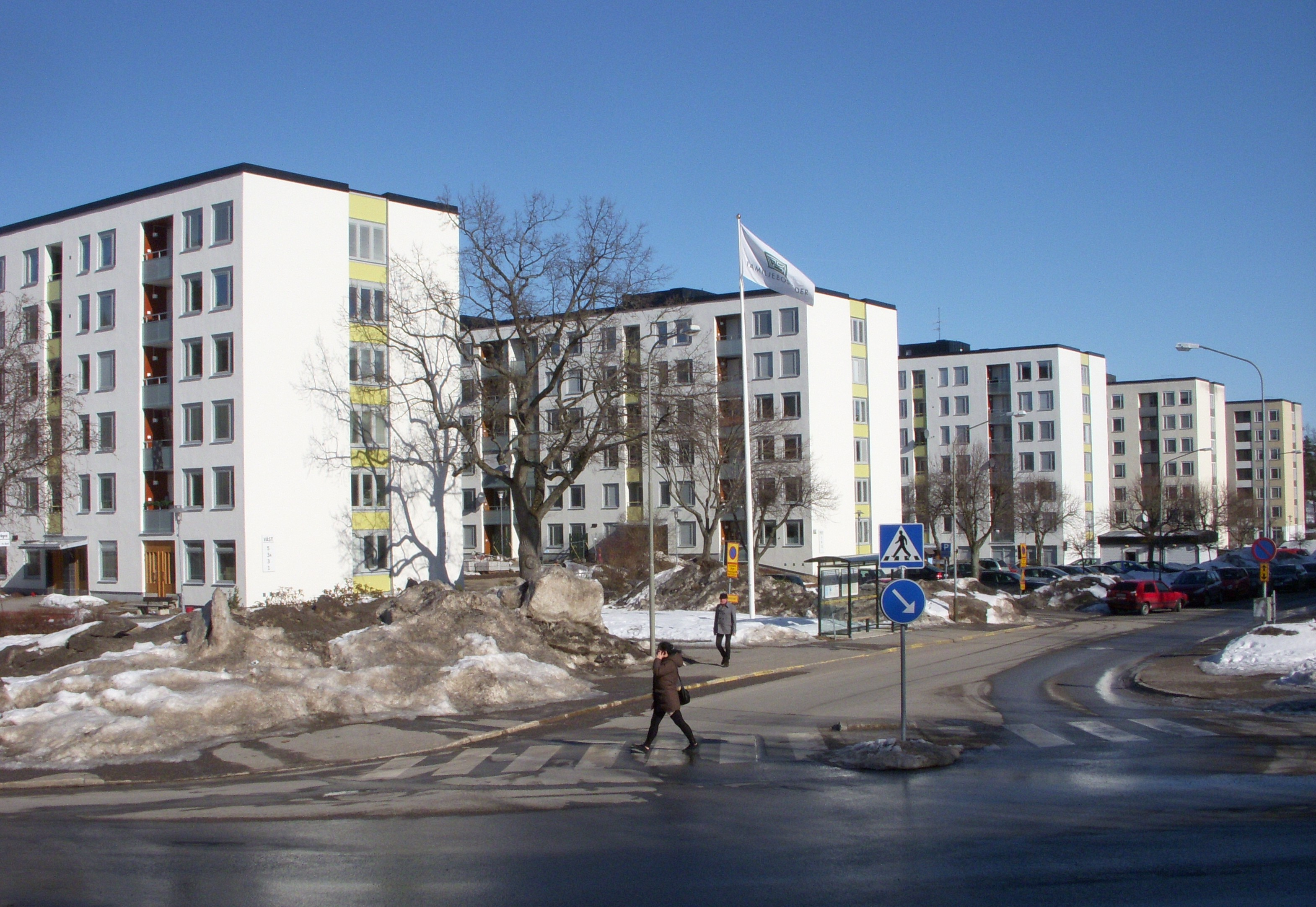 Farsta strand, typisk 1960-tals bebyggelse längs Nordmarksvägen uppförd av Familjebostäder